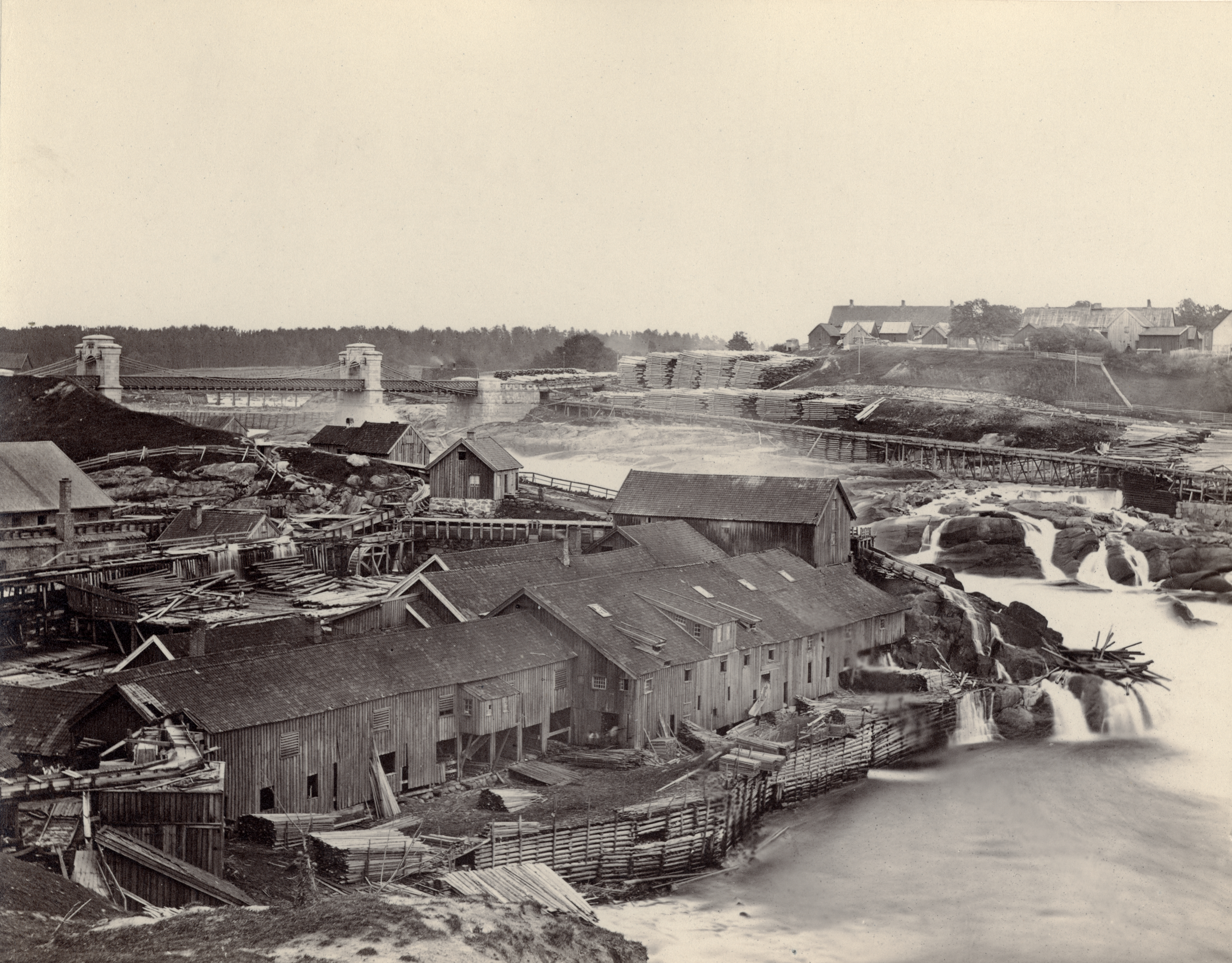 Borregård i Sarpsborg, Østfold This image on crowdsourcing geotagging platform Fotodugnad